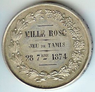 Médaille Jeu Tamis Millebosc Photo J.L Dron